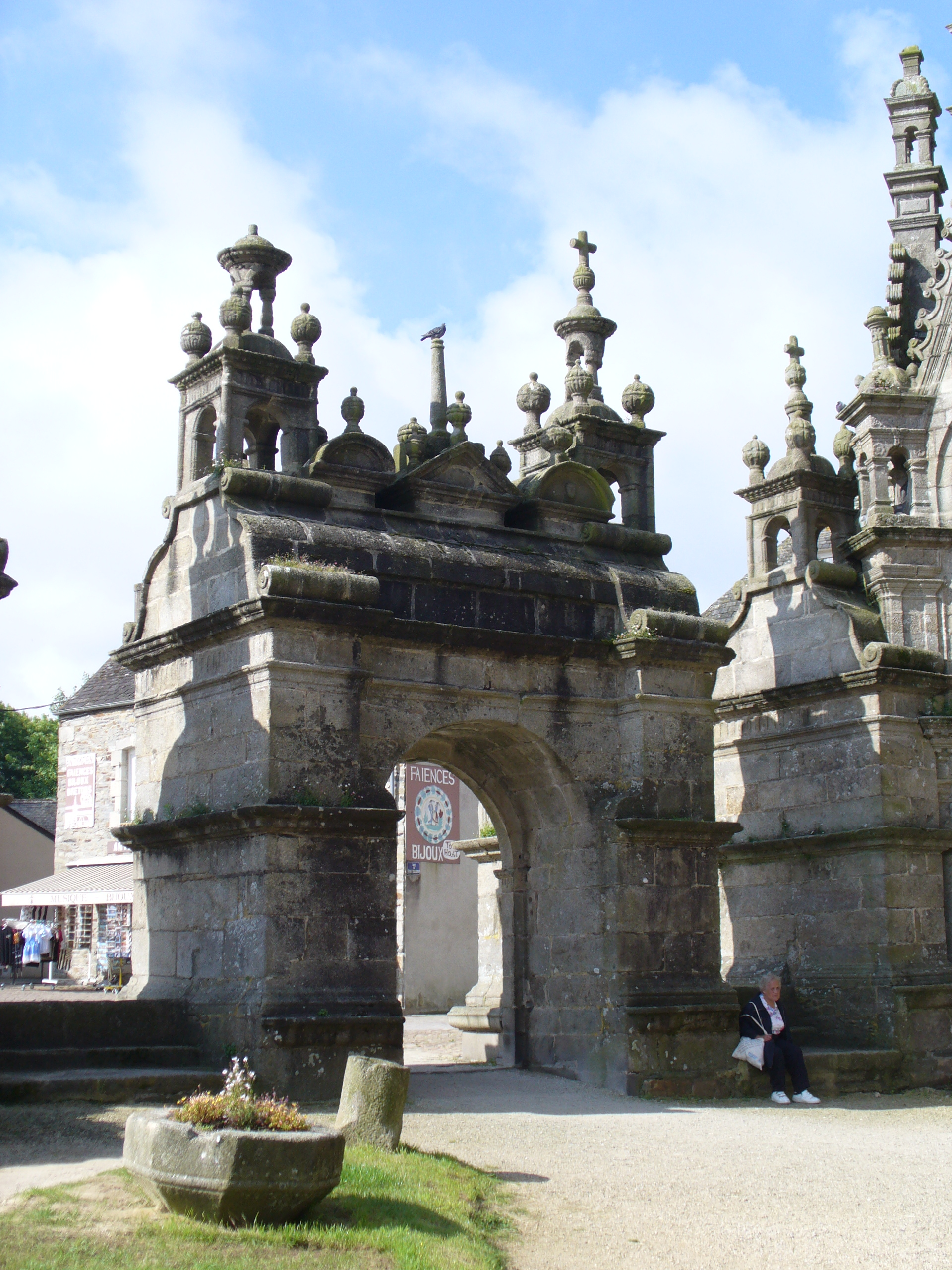 Triumphpforte(Porte de Triomphe-1587)-Saint Thégonnec-Umfriedeter Pfarrbezirk(enclos paroissial)-Département Finistère-Region Bretagne-France